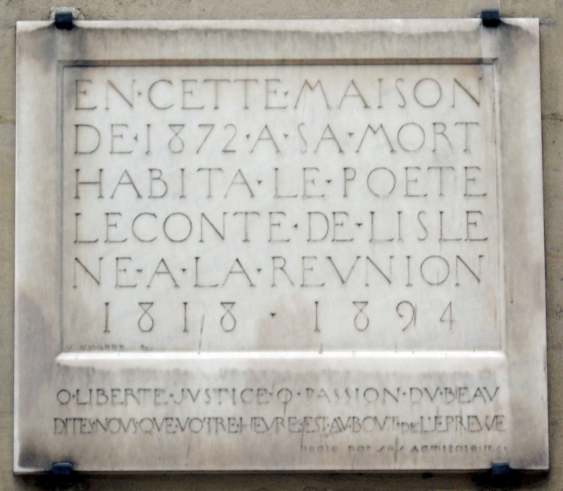 Plaque apposée au n° 64 du boulevard Saint-Michel, Paris 6e :En cette maison, de 1872 à sa mort, habita le poète Leconte de Lisle, né à la Réunion, 1818-1894.« Ô liberté, justice, ô passion du beau,Dites-nous que votre heure est au bout de l'épreuve. »Dédié par ses admirateurs.